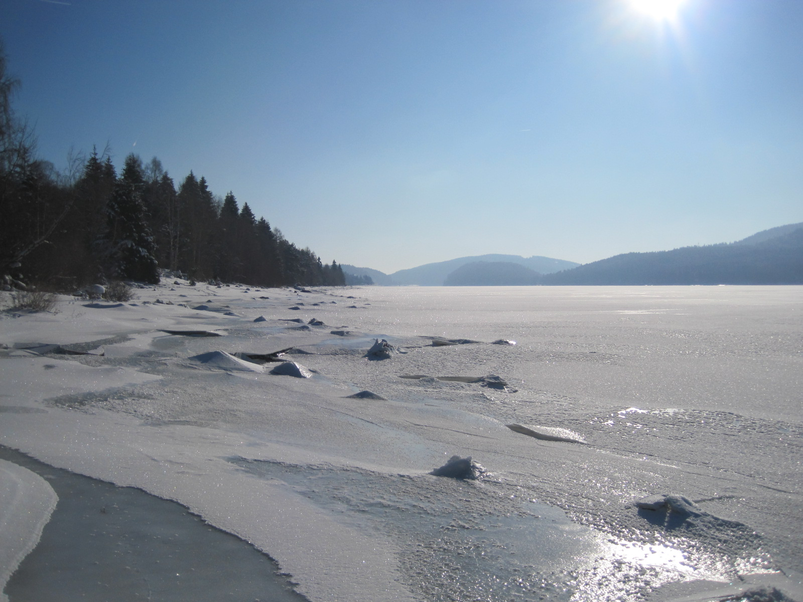 Der zugefrorene Schluchsee im Winter 2012.